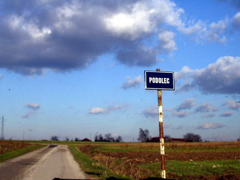 Podolec - Tabla